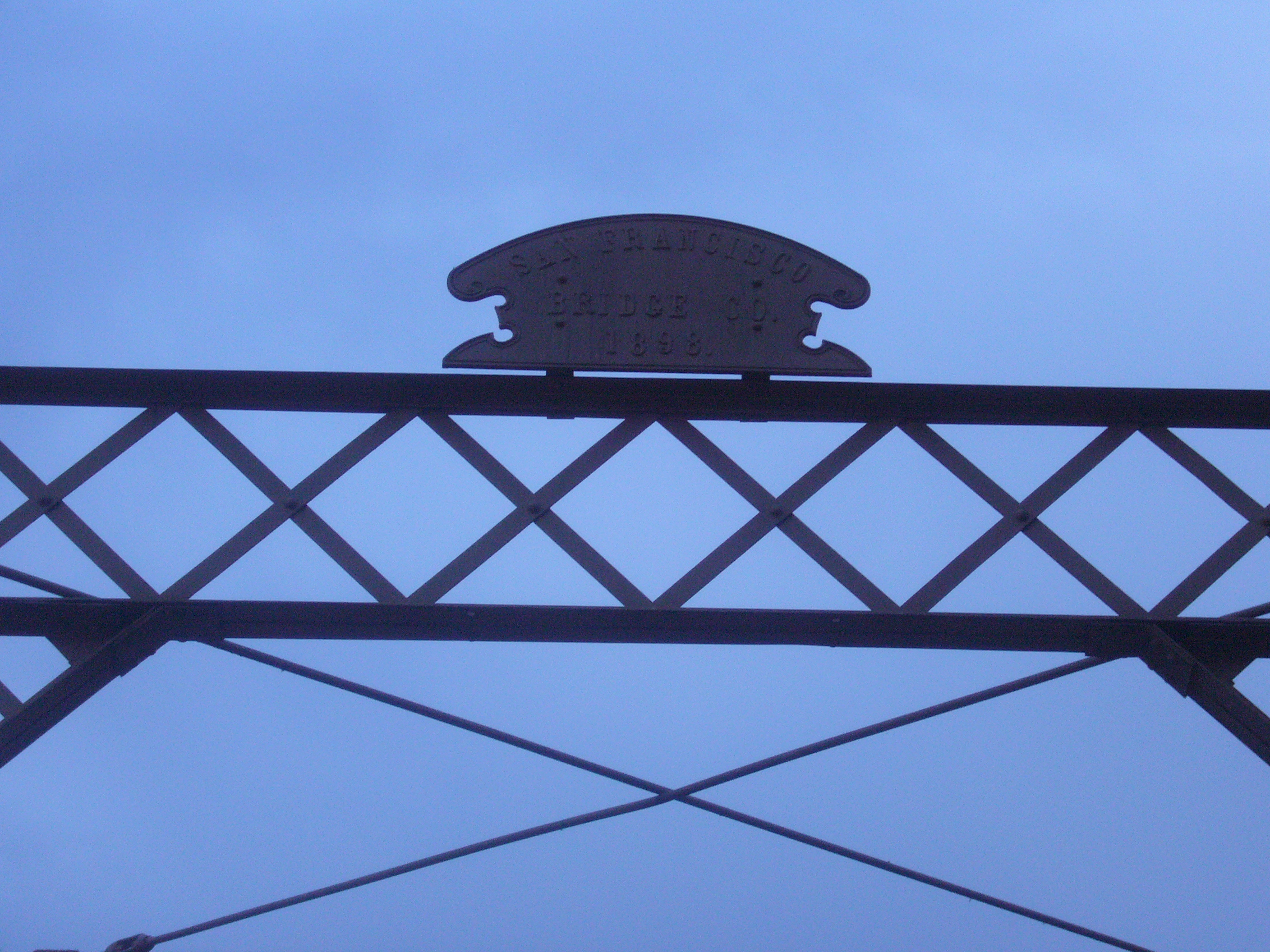 Placa de construcción del Puente Navarro Honda(Colombia)